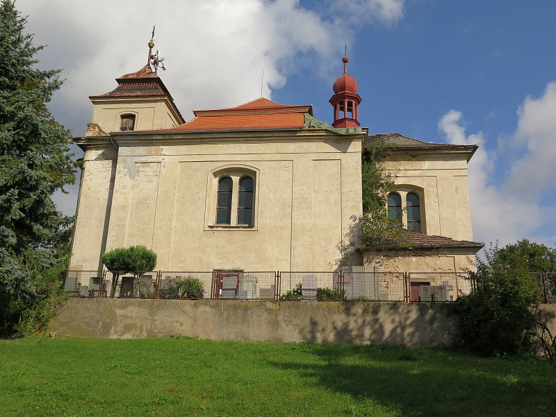 Kostel svaté Anny, severovýchodní část vsi, Týnec (Dobrovice).